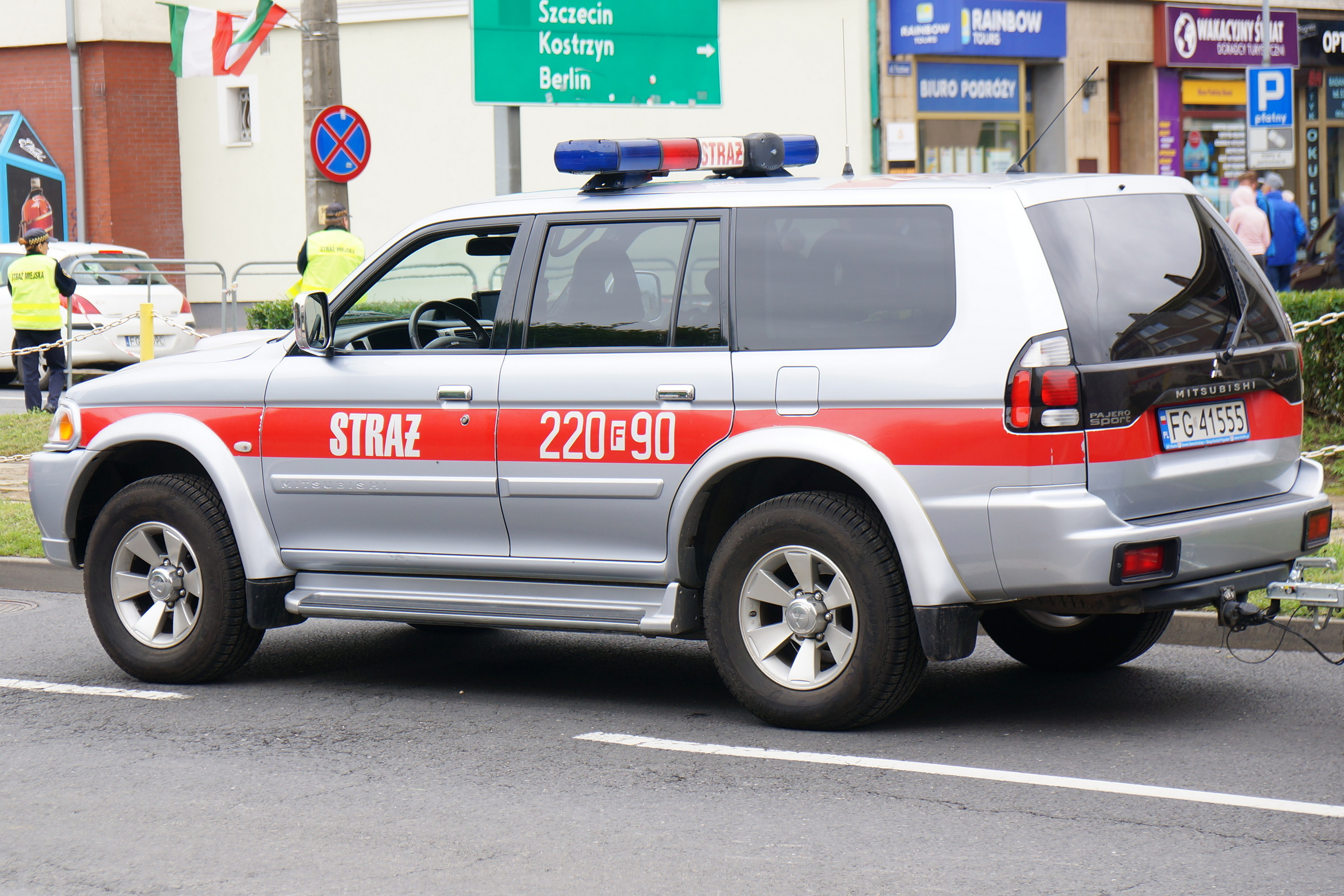 Samochód rozpoznawczo-ratowniczy SLRr - Mitsubishi Pajero Sport Komendy Wojewódzkiej PSP w Gorzowie Wlkp., podczas akcji gaśniczej w Gorzowie Wlkp.